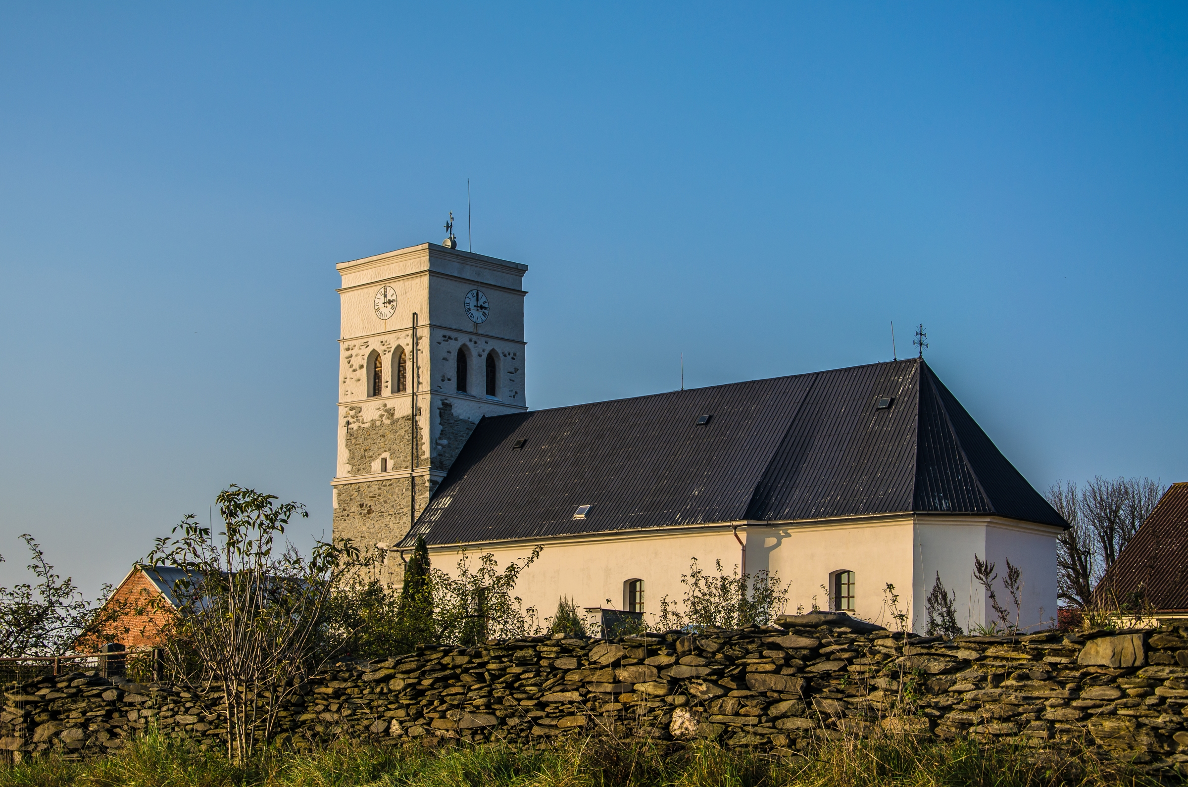 Kostel svaté Kunhuty, Paseka (okres Olomouc).